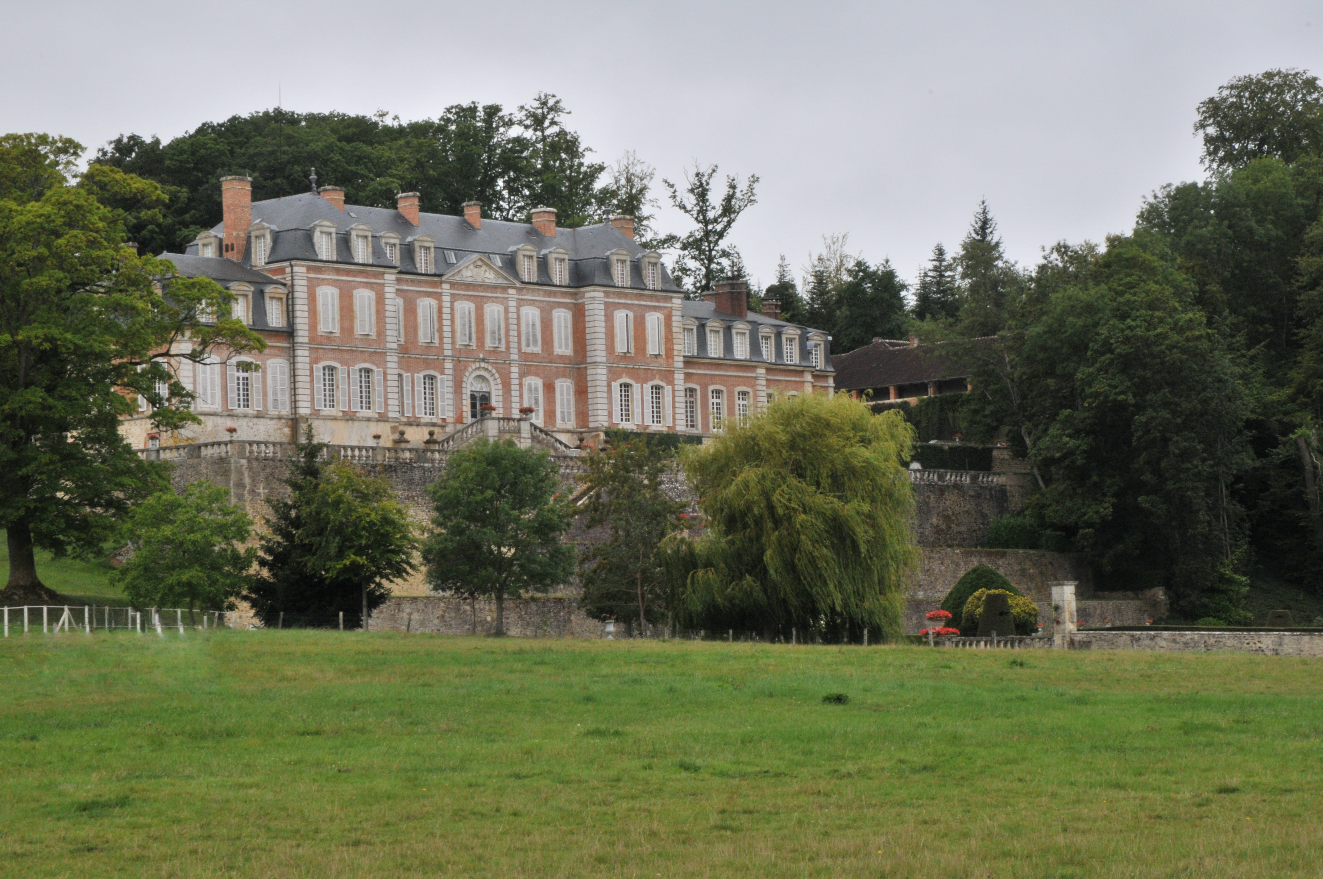 château de Sassy dans l'Orne.